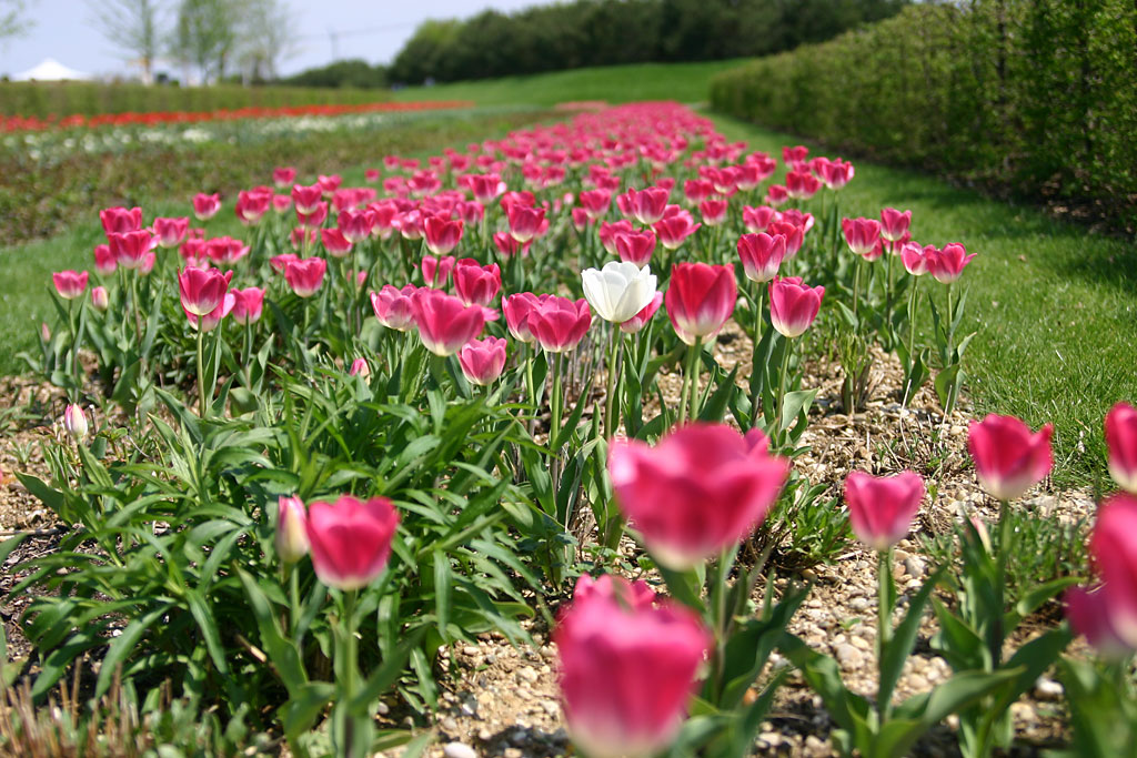 BUGA de:2005 in München Fotograf: Softeis , 01.05.2005